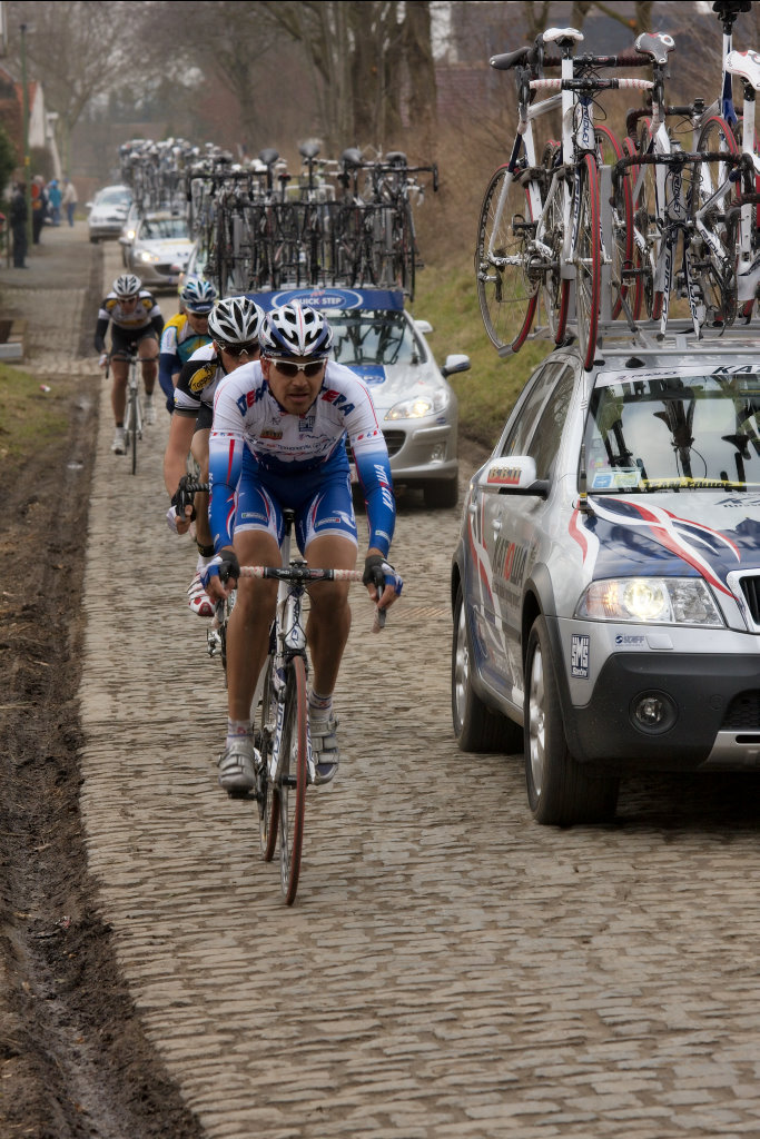 Nikolaj Trussov, Omloop Het Nieuwblad 2009